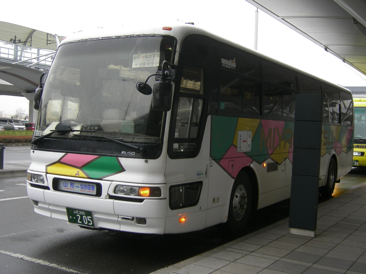 宮城交通（Miyagi kotsu） 三菱U-MS826P登録番号：山形200か･205（山形営業所所属）